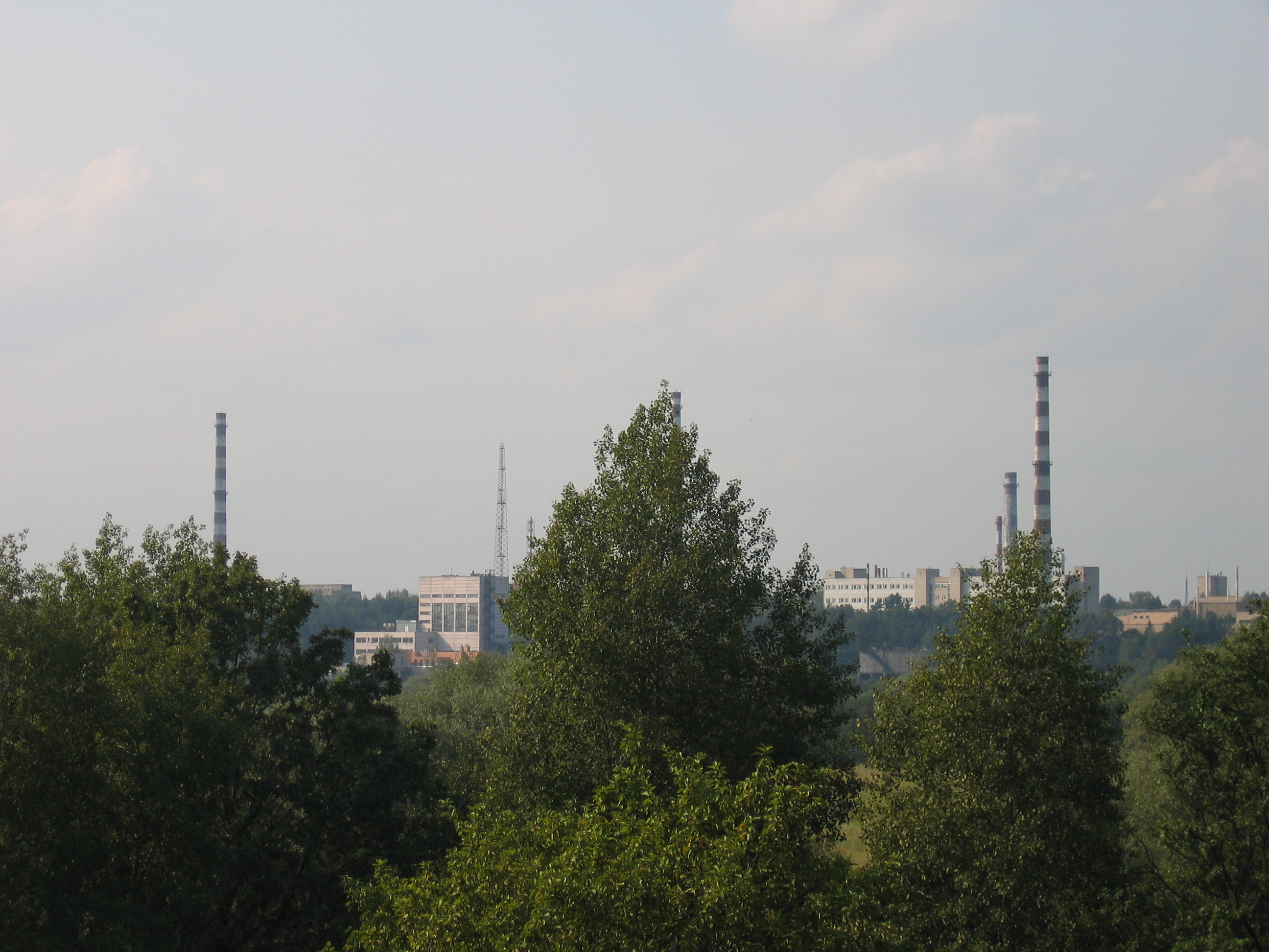 Das Kernkraftwerk Obninsk, Blick von Süden